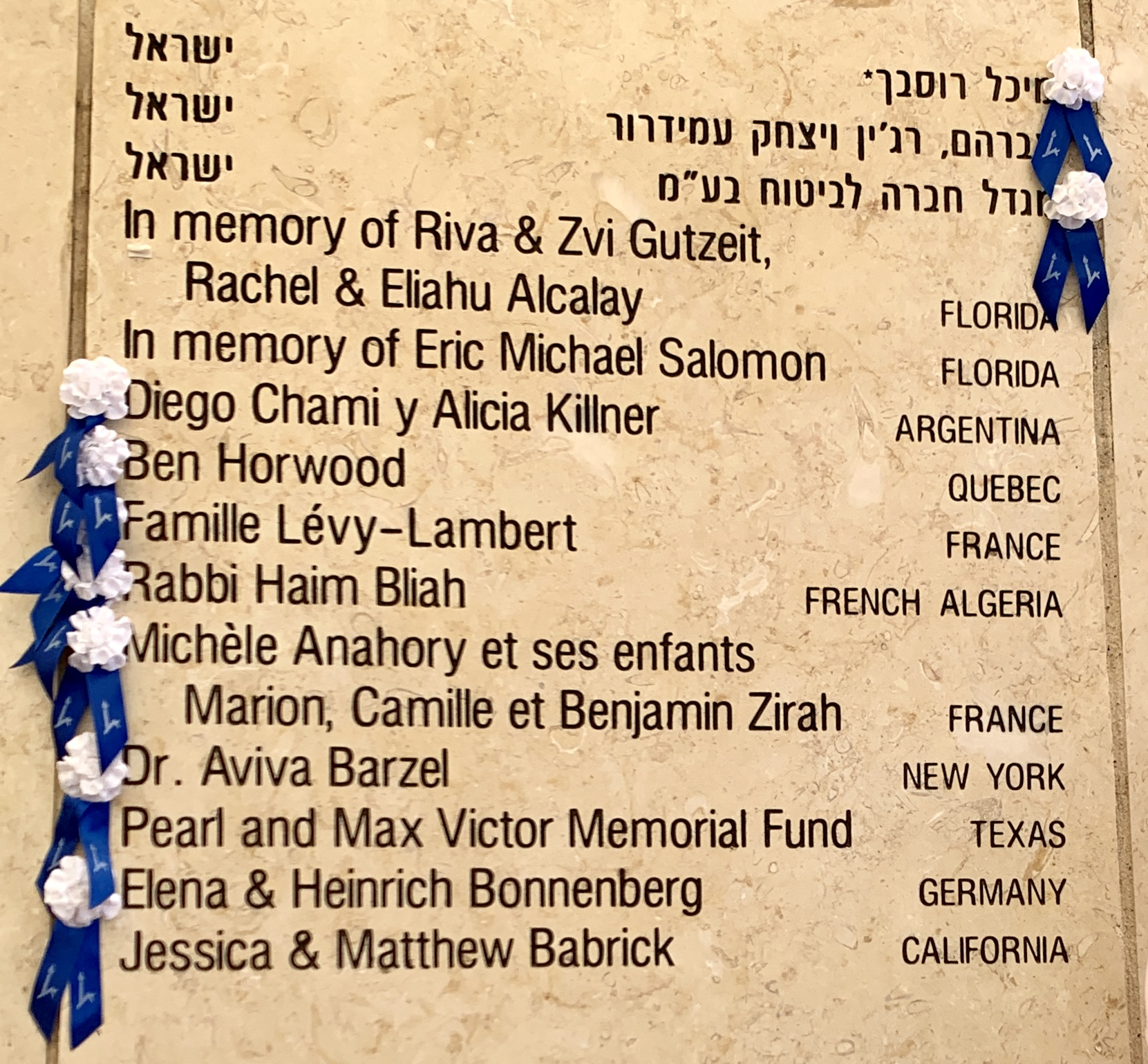 Ehrentafel Wall of Life der Hebräischen Universität Jerusalem